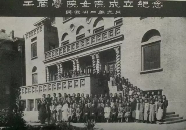 中文（中国大陆）: 1943年天津工商学院女子学院成立纪念